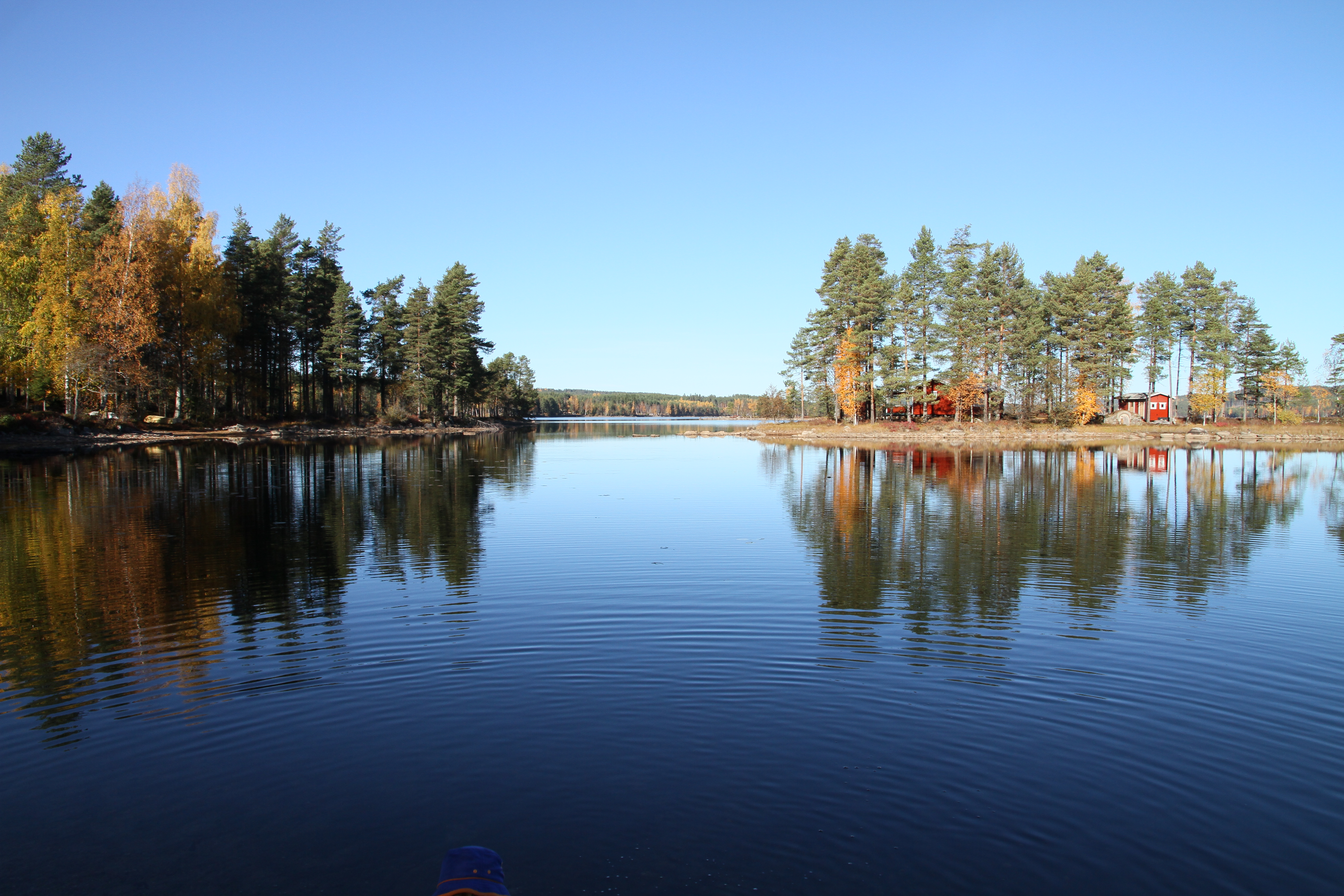 Stor-Jangen sedd från den sydvästra stranden.